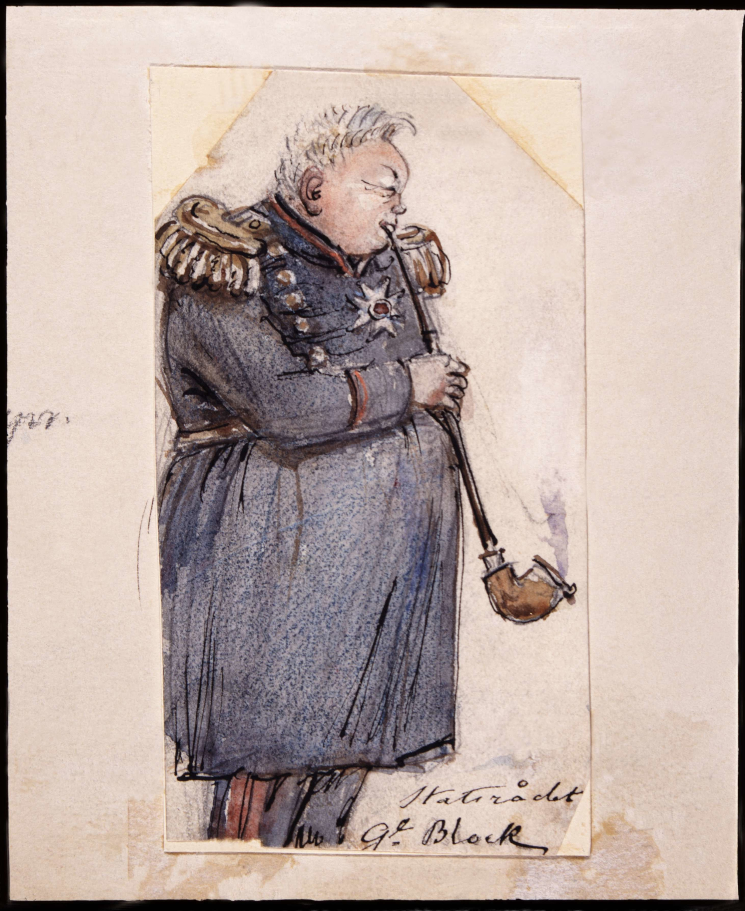 Stadsrådet Block röker pipa med långt skaft. Akvarell av Fritz von Dardel.